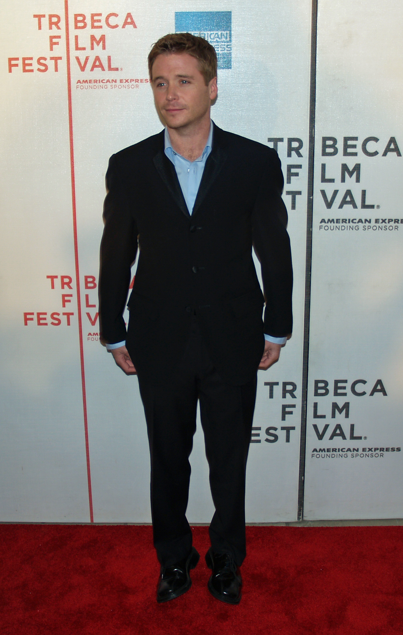 Kevin Connolly